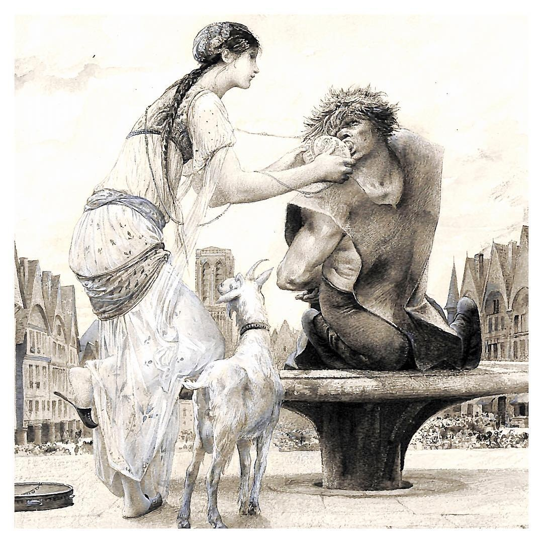 La Esmeralda donne à boire à Quasimodo sur le pilori. Plume, lavis gouache sur vélin, Paris, Musée Victor Hugo.